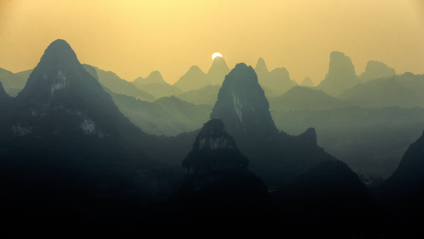 El Sol se pone sobre las montañas de Guilin, China